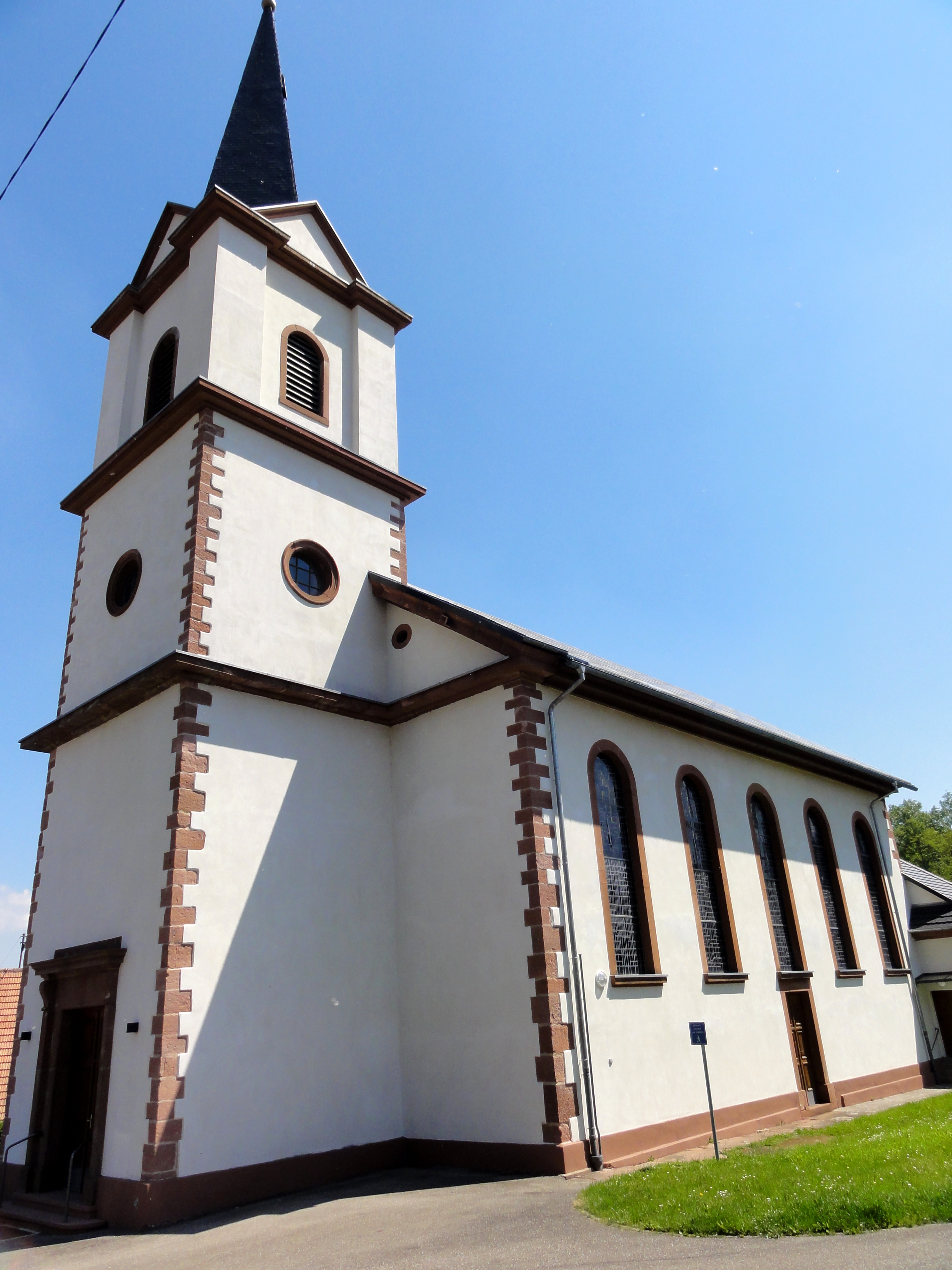 Alsace, Bas-Rhin, Gumbrechtshoffen, Église protestante (1834), 1 rue de l'Eglise.